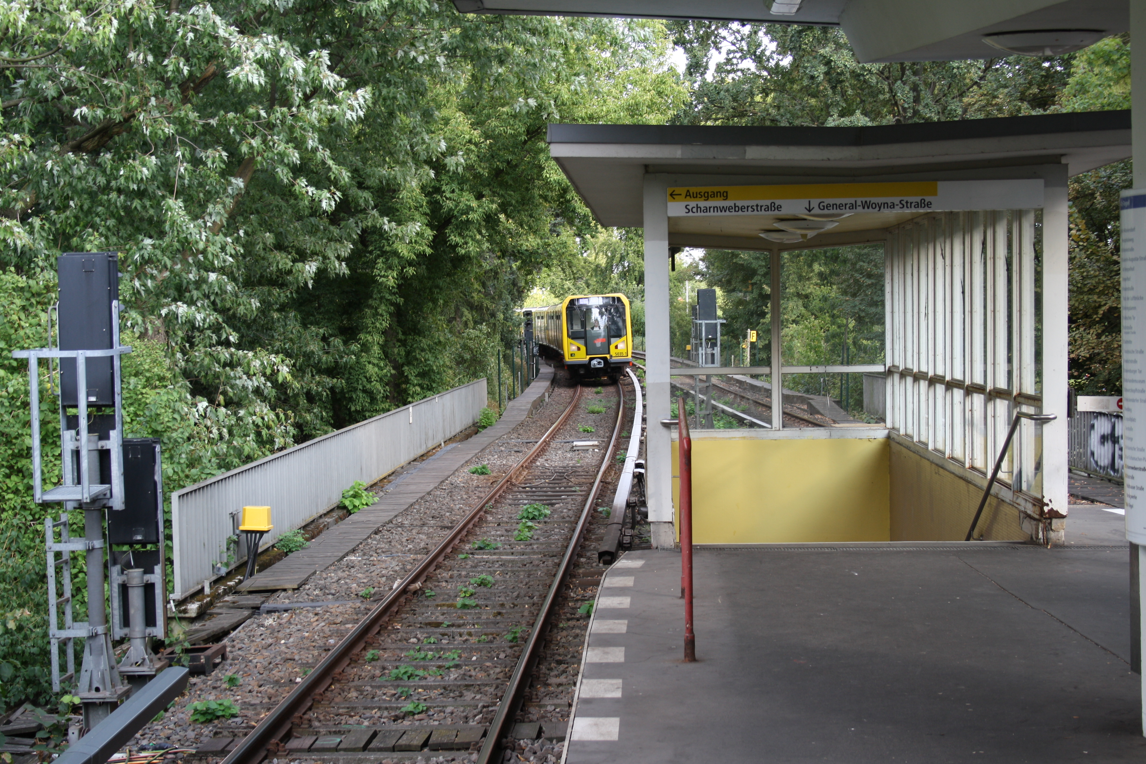 U-Bhf. Scharnweberstraße Berlin